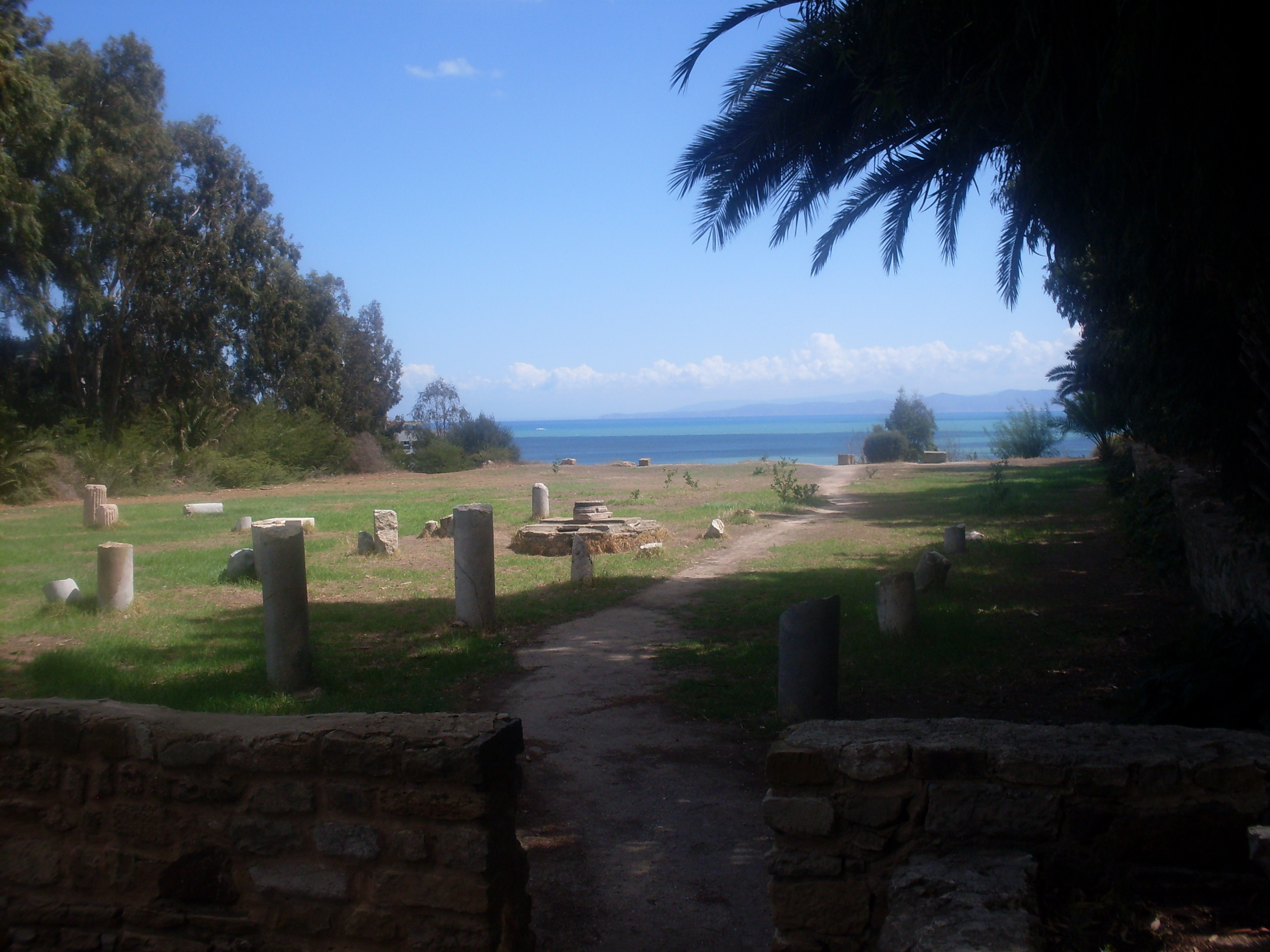 Tunisie, Carthage, Basilique St Cyprien